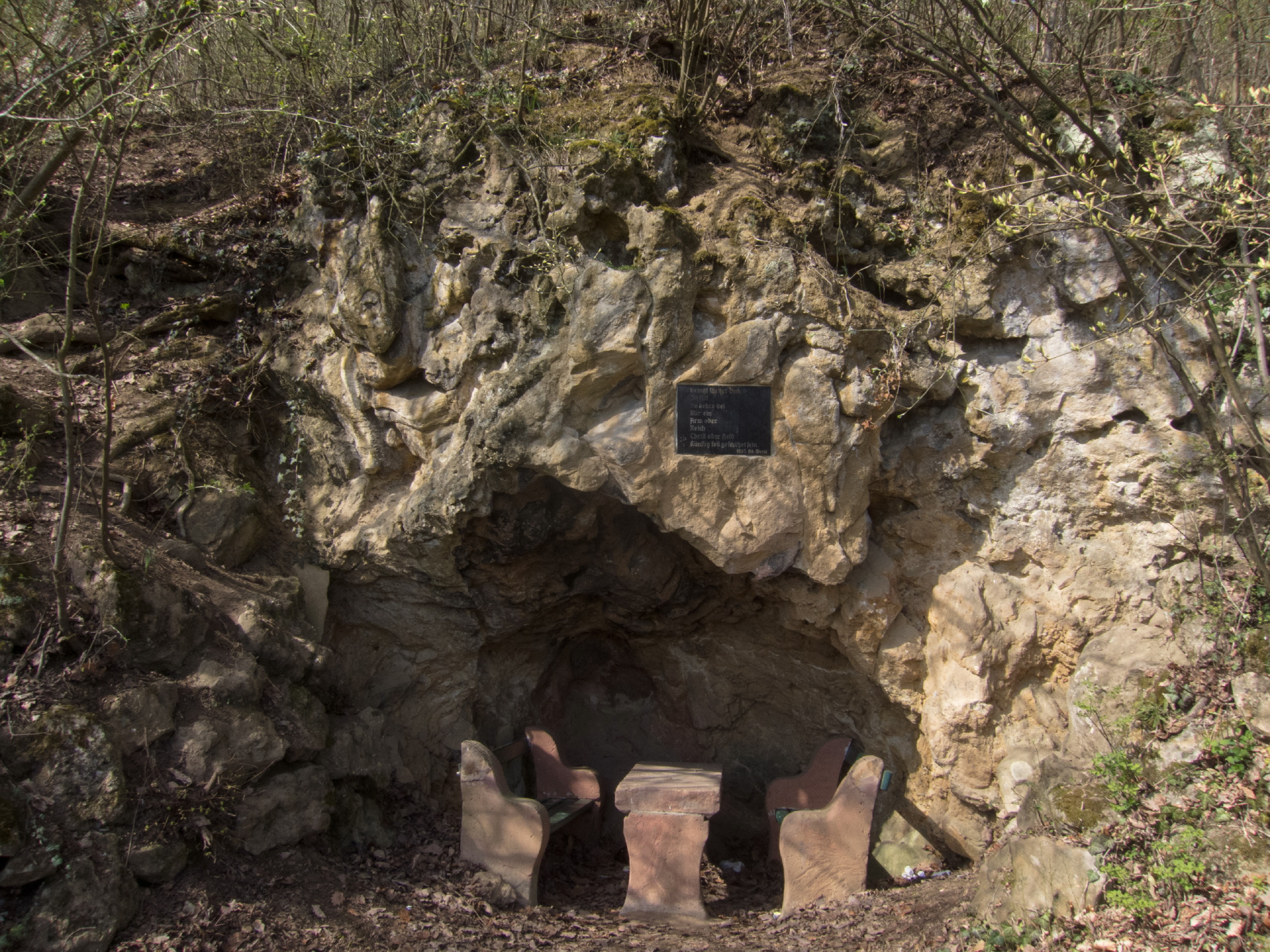 ND-7332-547 Bismarkhöhle, Naturdenkmal bei Forst